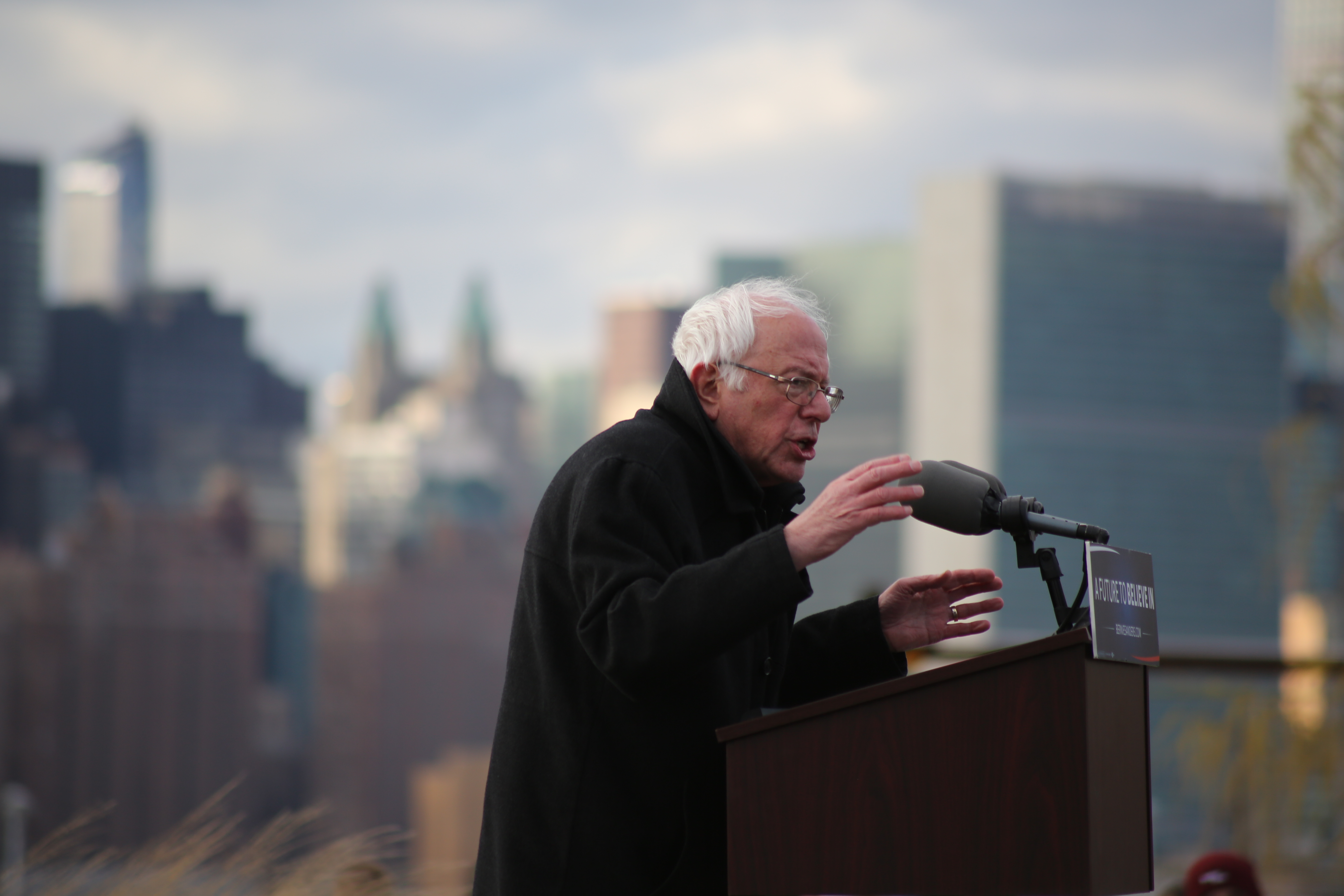 Transmitter Park, Greenpoint, Brooklyn